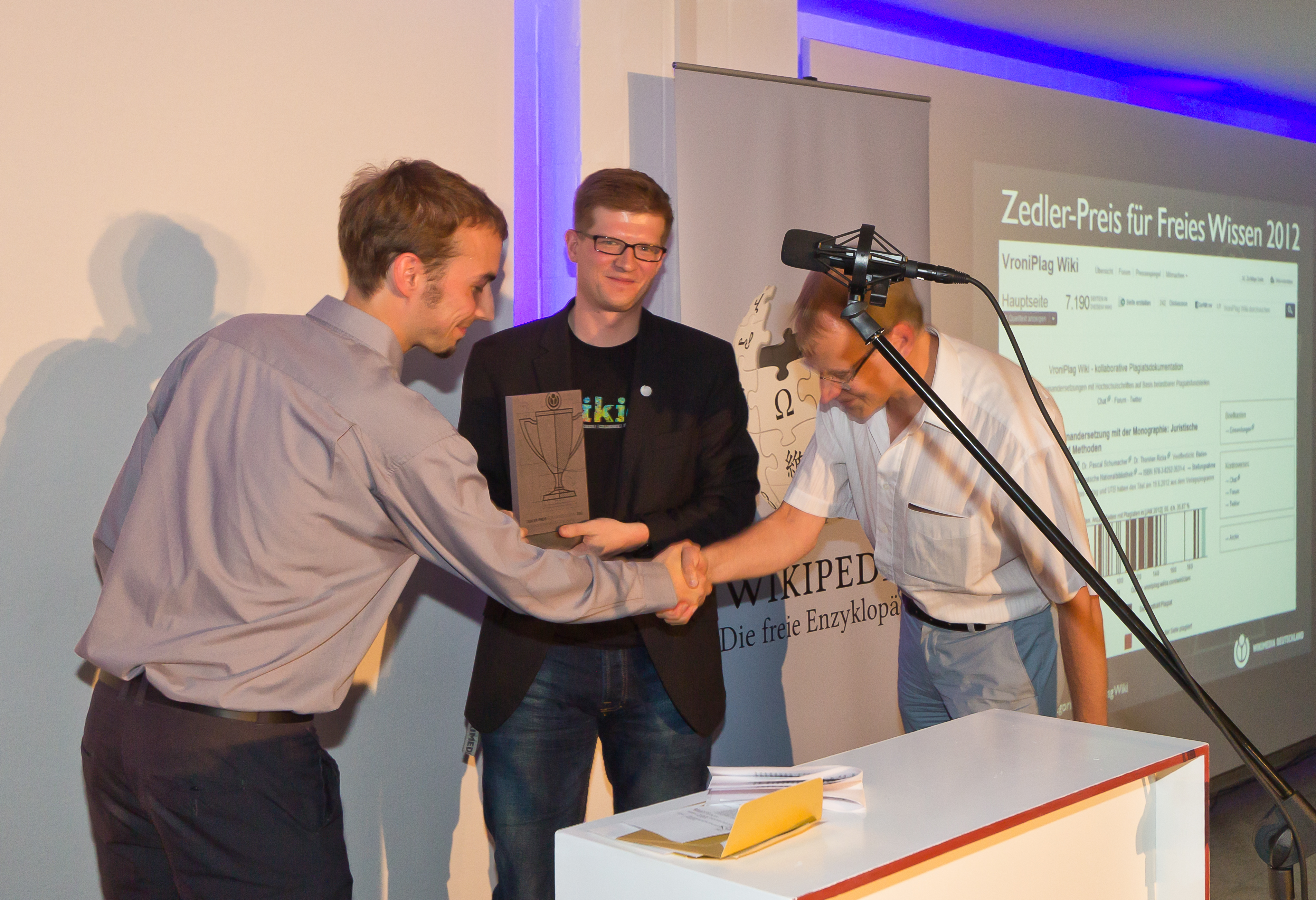 Verleihung „Zedler-Preis für freies Wissen 2012“ durch Wikimedia Deutschland e.V. im „Supermarkt“, Brunnenstraße 64, Berlin Foto: Übergabe des Preises in der Kategorie III durch Jurymitglied und Laudator John Hendrik Weitzmann (Creative Commons Deutschland und ) an Vertreter des VroniPlag-Wikis